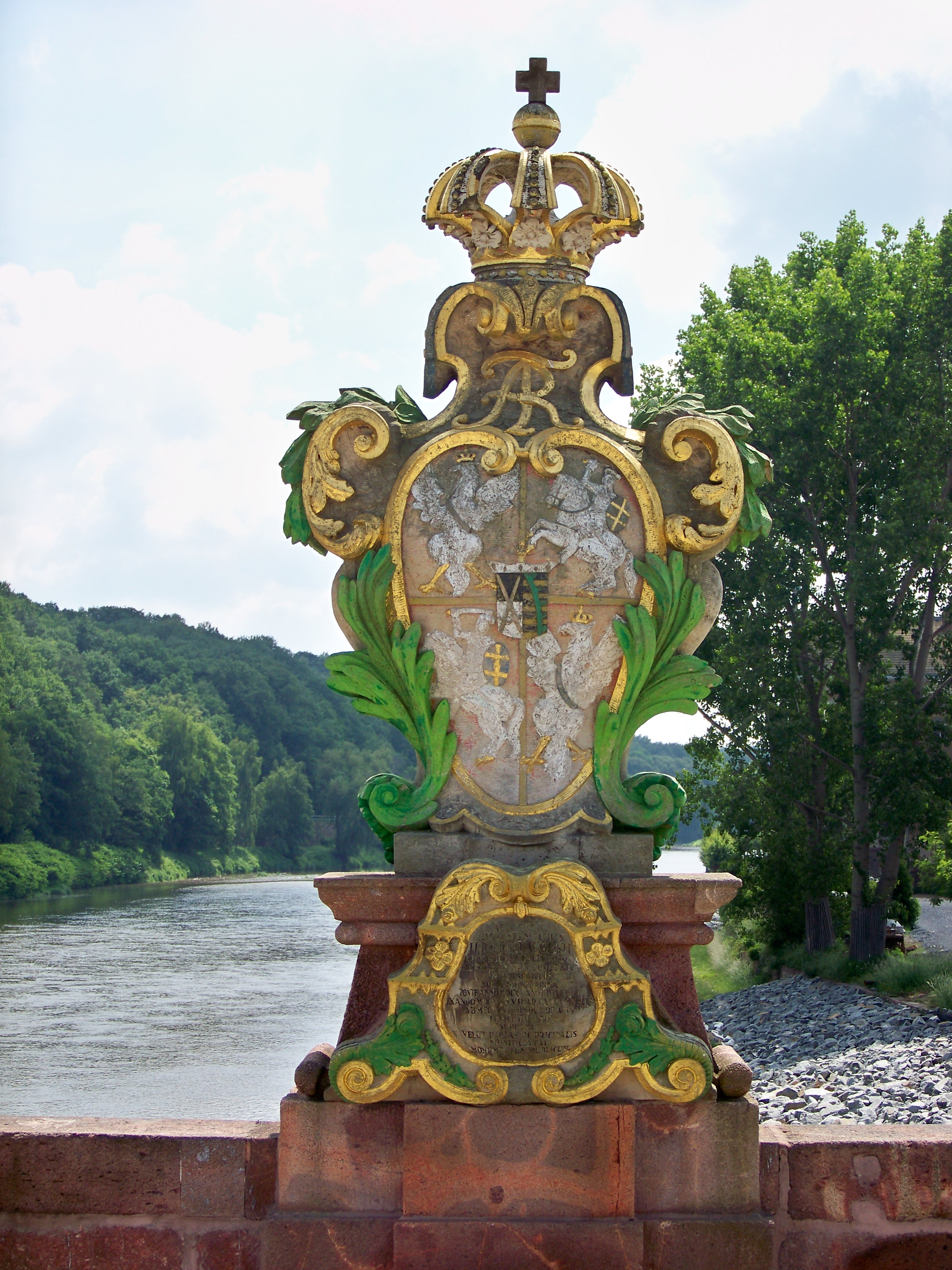 Sächsisches Wappen auf der Pöppelmannbrücke in Grimma